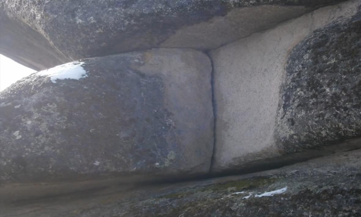 Место соединения камней